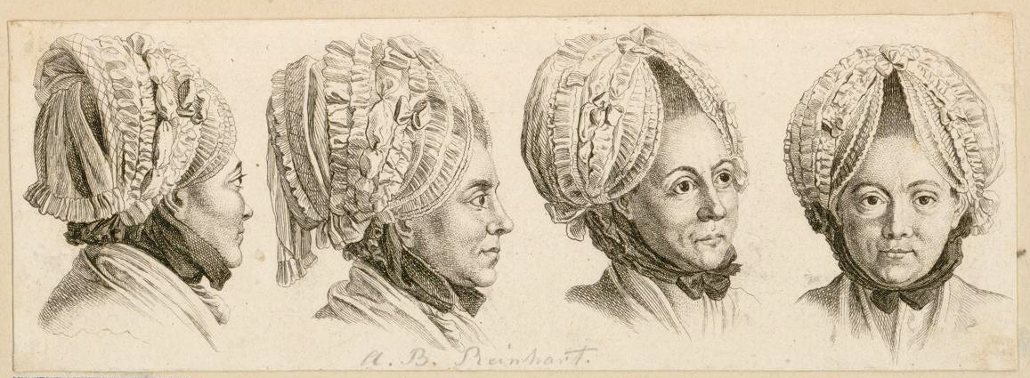 Anonyme Druckgraphik